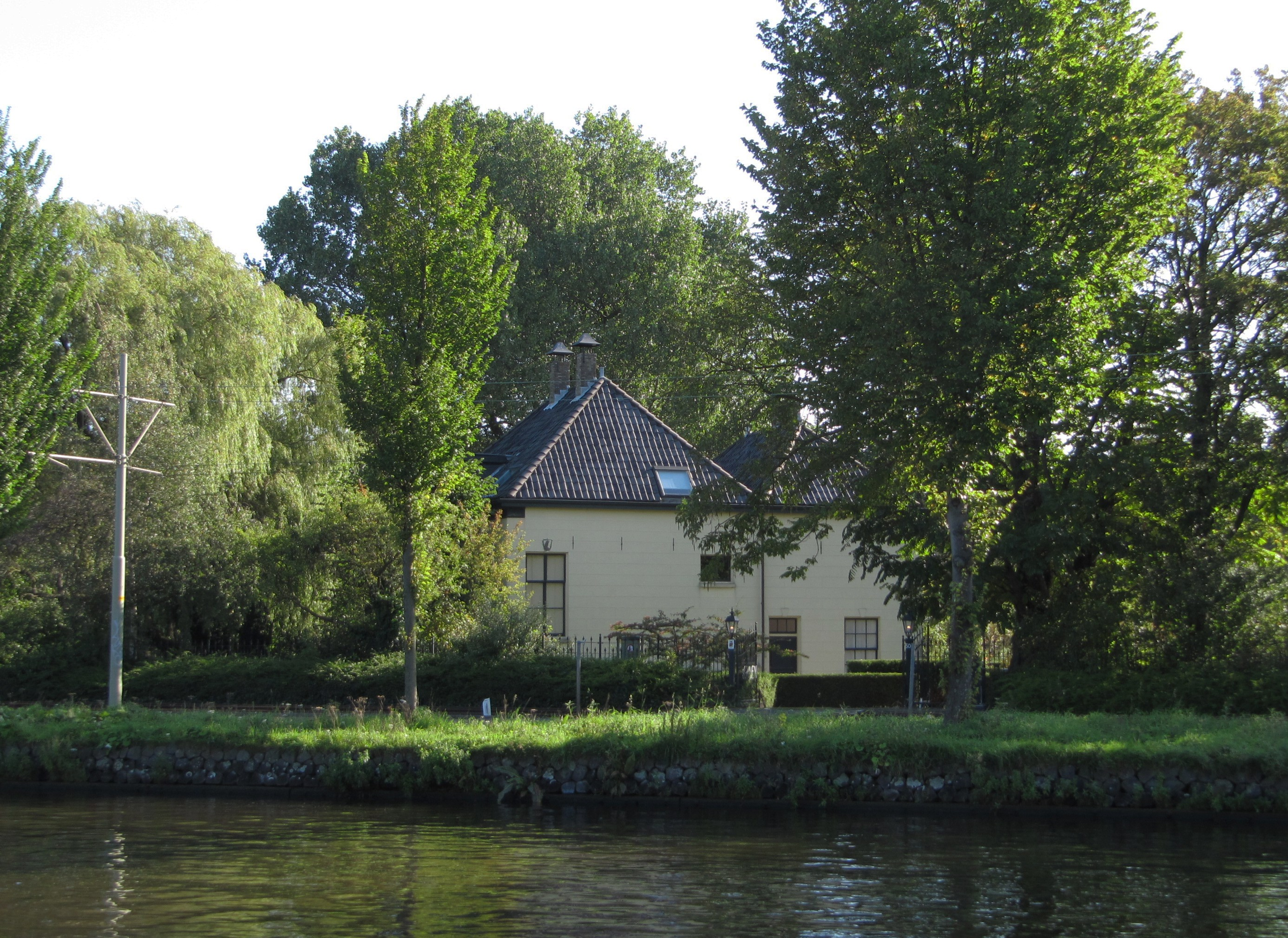 RM20040 Rijswijk - Delftweg 50.jpg